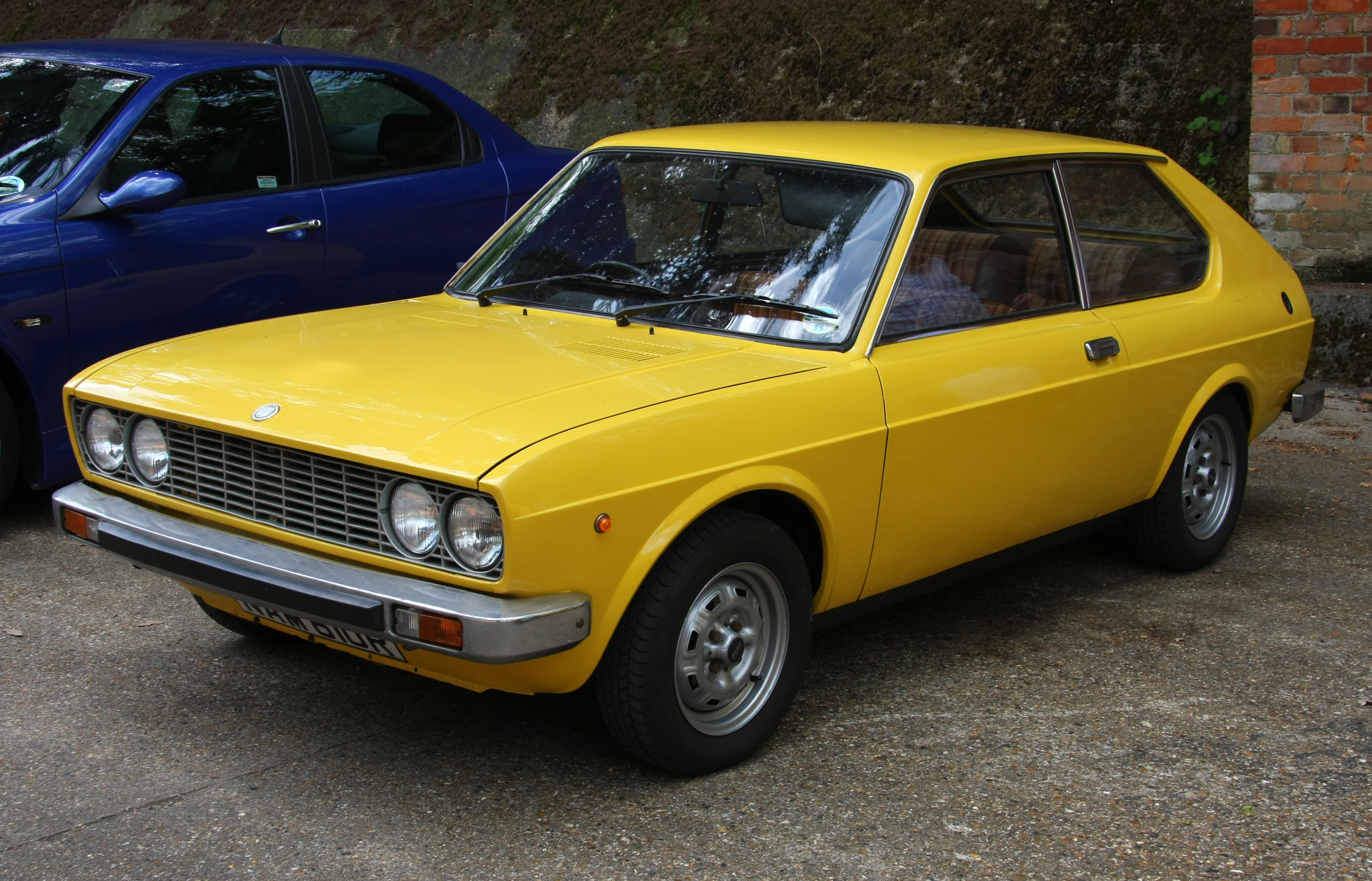 Fiat 128 3p at Auto Italia Brooklands, May 2009.